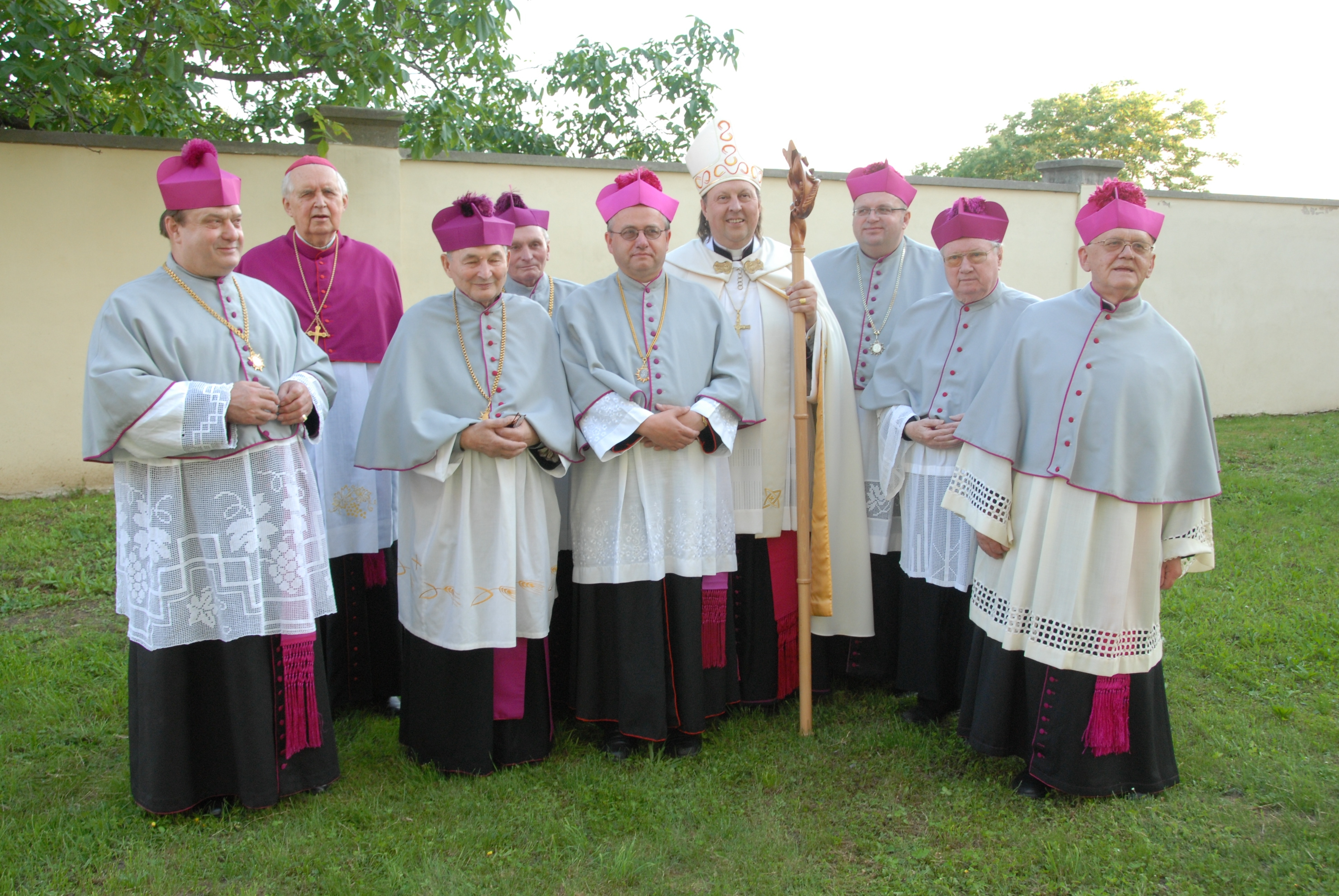 Kanovníci litoměřické katedrální kapituly sv. Štěpána při oslavách 950 let od založení, 8. června 2007